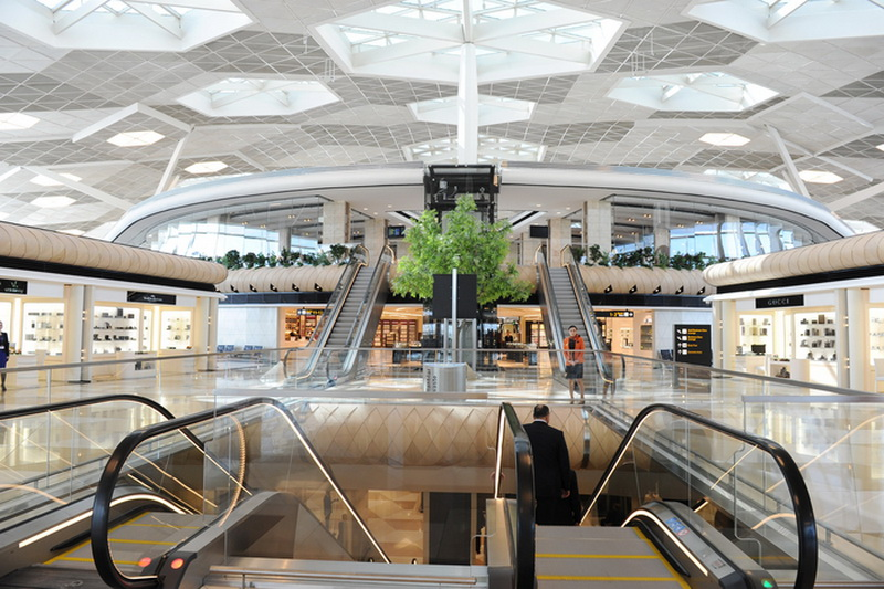 Heydər Əliyev Beynəlxalq Hava Limanının 1-ci terminalın daxili